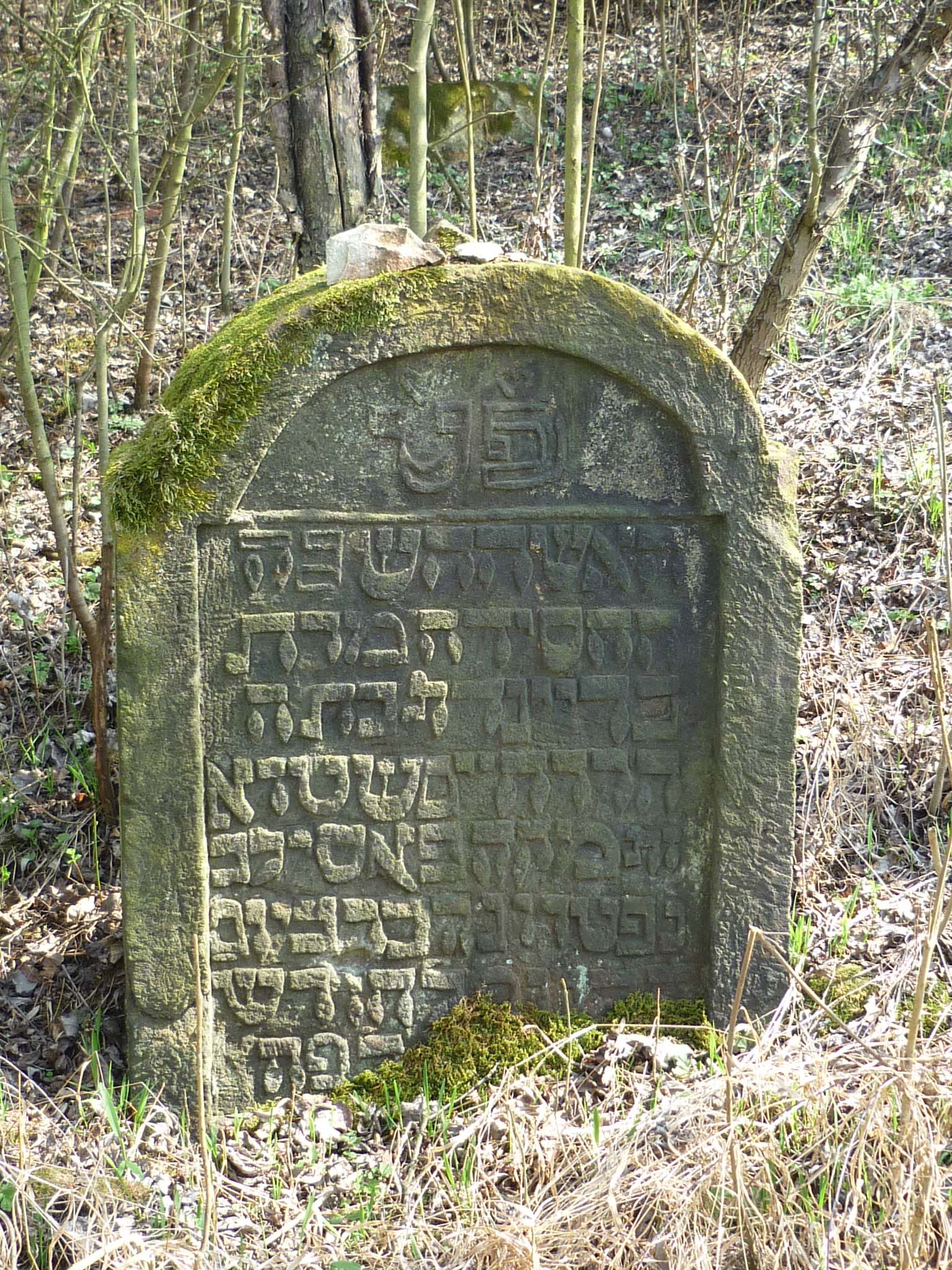 Verfallene Grabstätten und Grabsteine auf dem Alten Jüdischen Friedhof in Liebeschitz bei Saaz (Liběšice u Žatce) in Nordböhmen